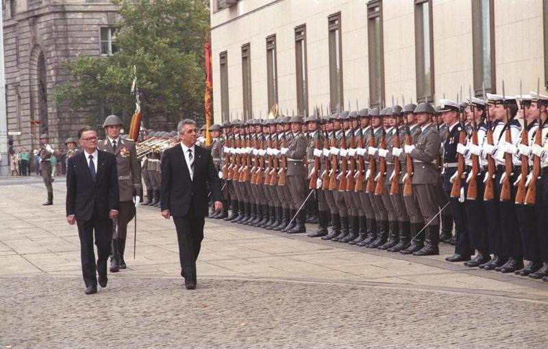 Berlin, Egon Krenz, neuer Staatsratsvorsitzender ADN-ZB/Reiche/24.10.89/Berlin: Zeremoniell Vor dem Sitz des Staatsrates am Marx-Engels-Platz wurde der neue Vorsitzende des Staatsrates der DDR, Egon Krenz, Generalsekretär des ZK der SED, zu seinem offiziellen Amtsantritt mit militärischen Ehren begrüßt. An seiner Seite Heinz Eichler, Sekretär des Staatsrates. Abgebildete Personen: Krenz, Egon: Vorsitzender der FDJ, Generalsekretär des ZK der SED, Staatsratsvorsitzender, DDR Eichler, Heinz: Sekretär des Staatsrates, DDR